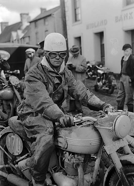 Teitl Cymraeg/Welsh title:Treialon modur rhyngwladol yn Llandrindod Ffotograffydd/Photographer: Geoff Charles (1909-2002) Dyddiad/Date: September 30, 1950 Cyfrwng/Medium: Negydd ffilm / Film negative Cyfeiriad/Reference: (gch00943) Rhif cofnod / Record no.: 3367404 Rhagor o wybodaeth am gasgliad Geoff Charles yn Llyfrgell Genedlaethol Cymru More information about the Geoff Charles Collection at the National Library of Wales